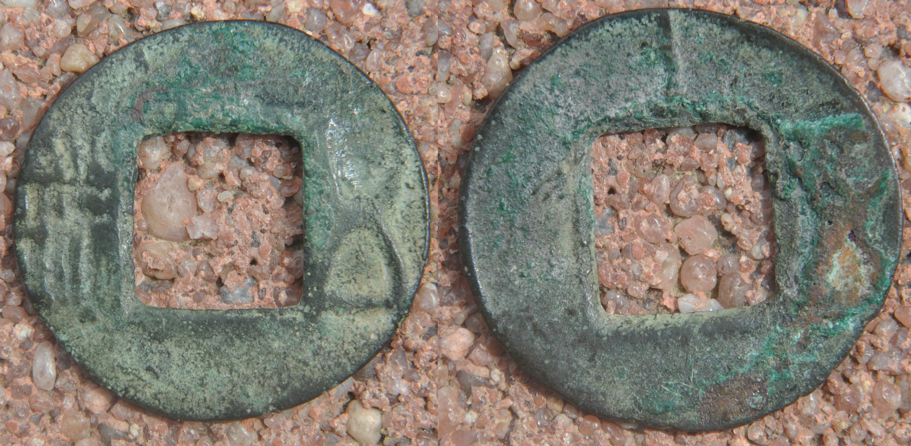 S514, Han de l'Est, période de crise à partir de 184, A/ Wu Zhu R/ Shi Wu, pas de rebord ni interne ni externe. Dimension : 22.73 mm Poids : 2.3 g. Bronze